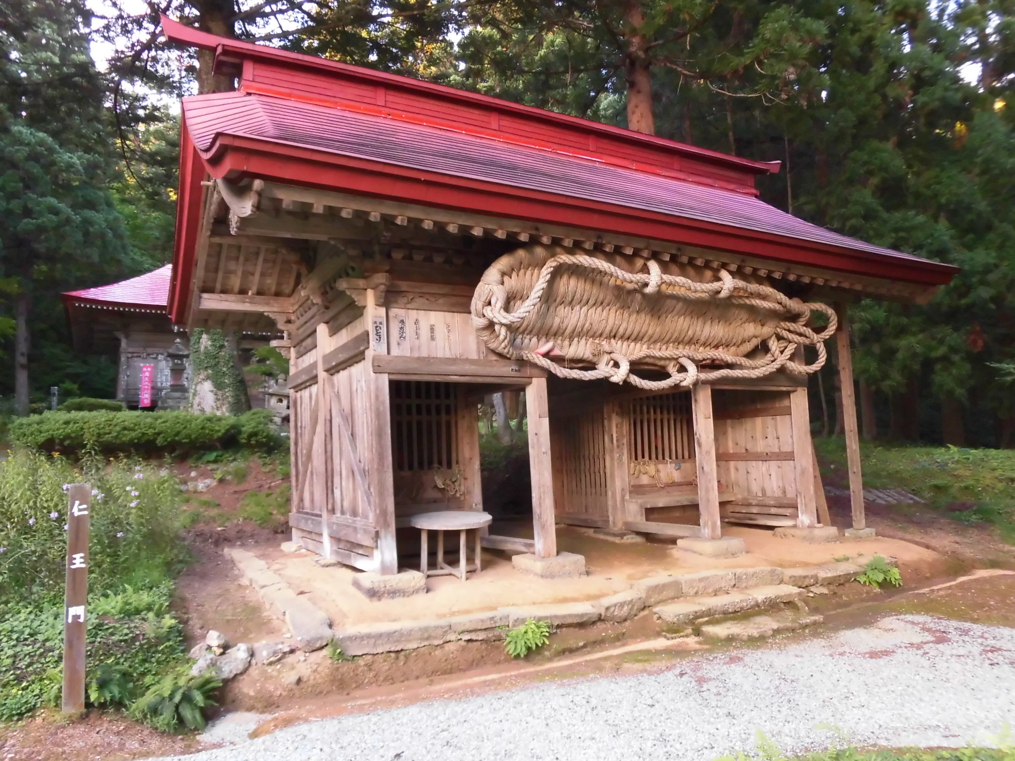 小松沢観音の仁王門。山形県村山市に所在。 最上三十三観音霊場の第二十番札所。 仁王門にある大わらじが特徴。